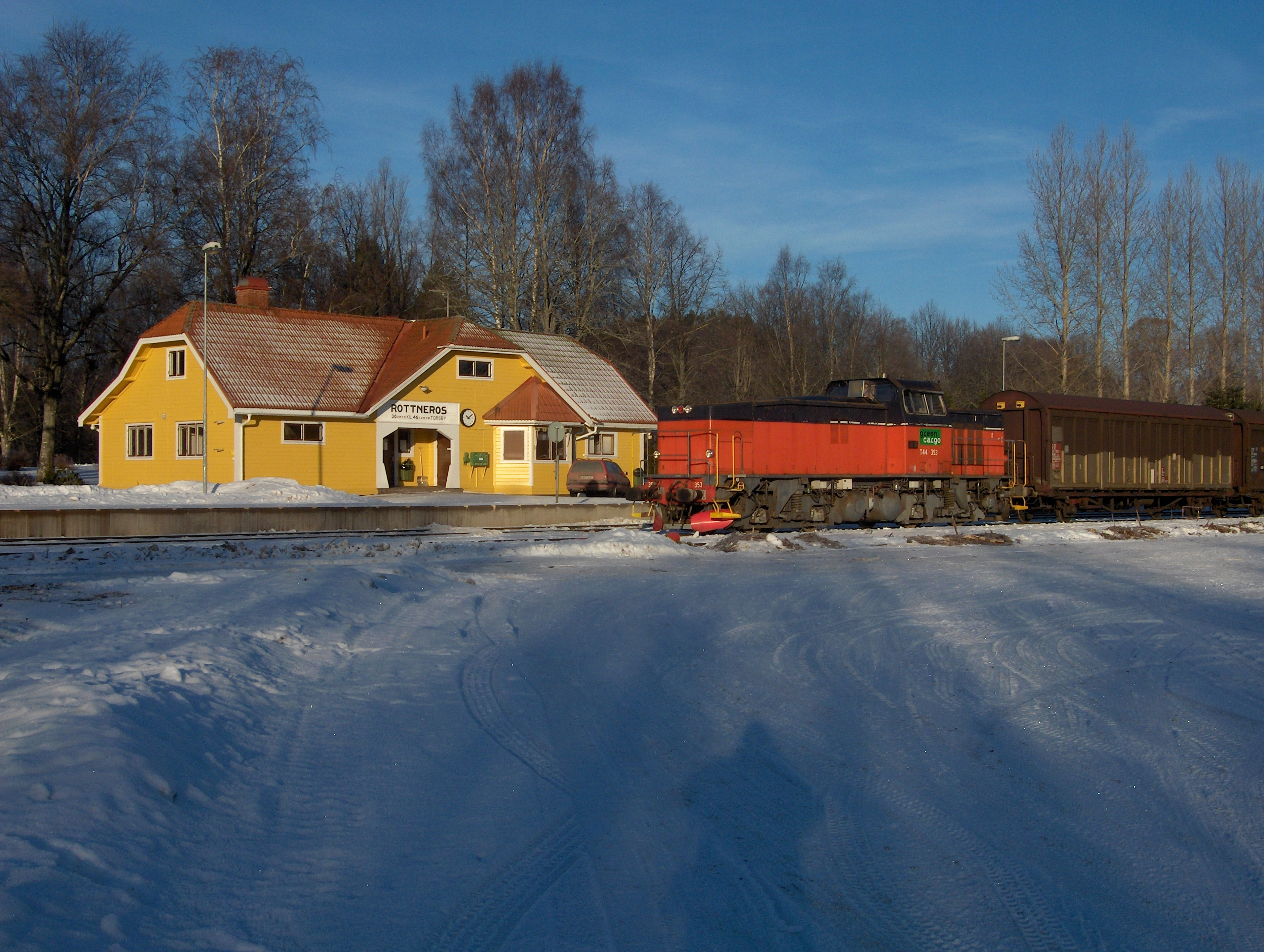 Güterzug im Bahnhof Rottneros. Freight train at Rottneros, Sweden.